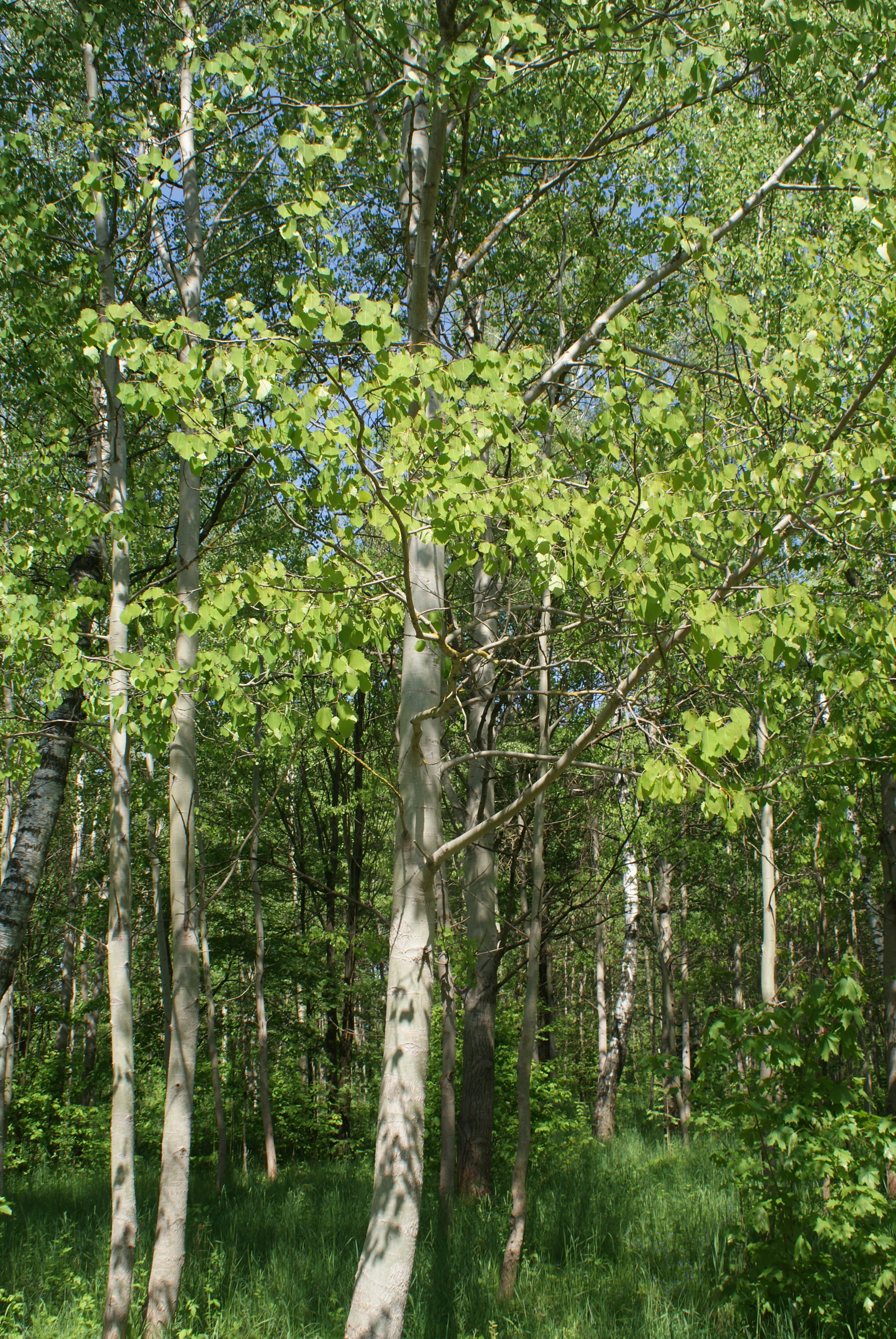 Невядомае дрэва ў Севастопальскім парку Мінска